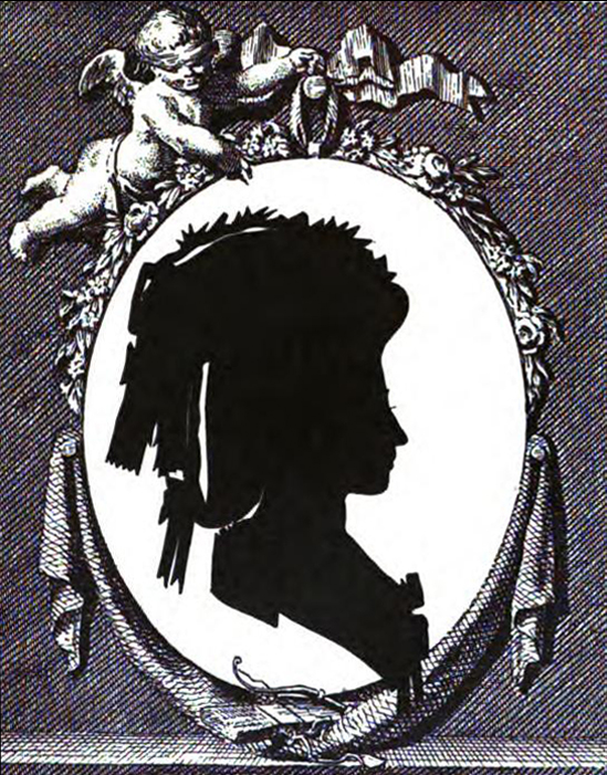 Прасковья Андреевна Потемкина, ур Закревская (1763-1816).